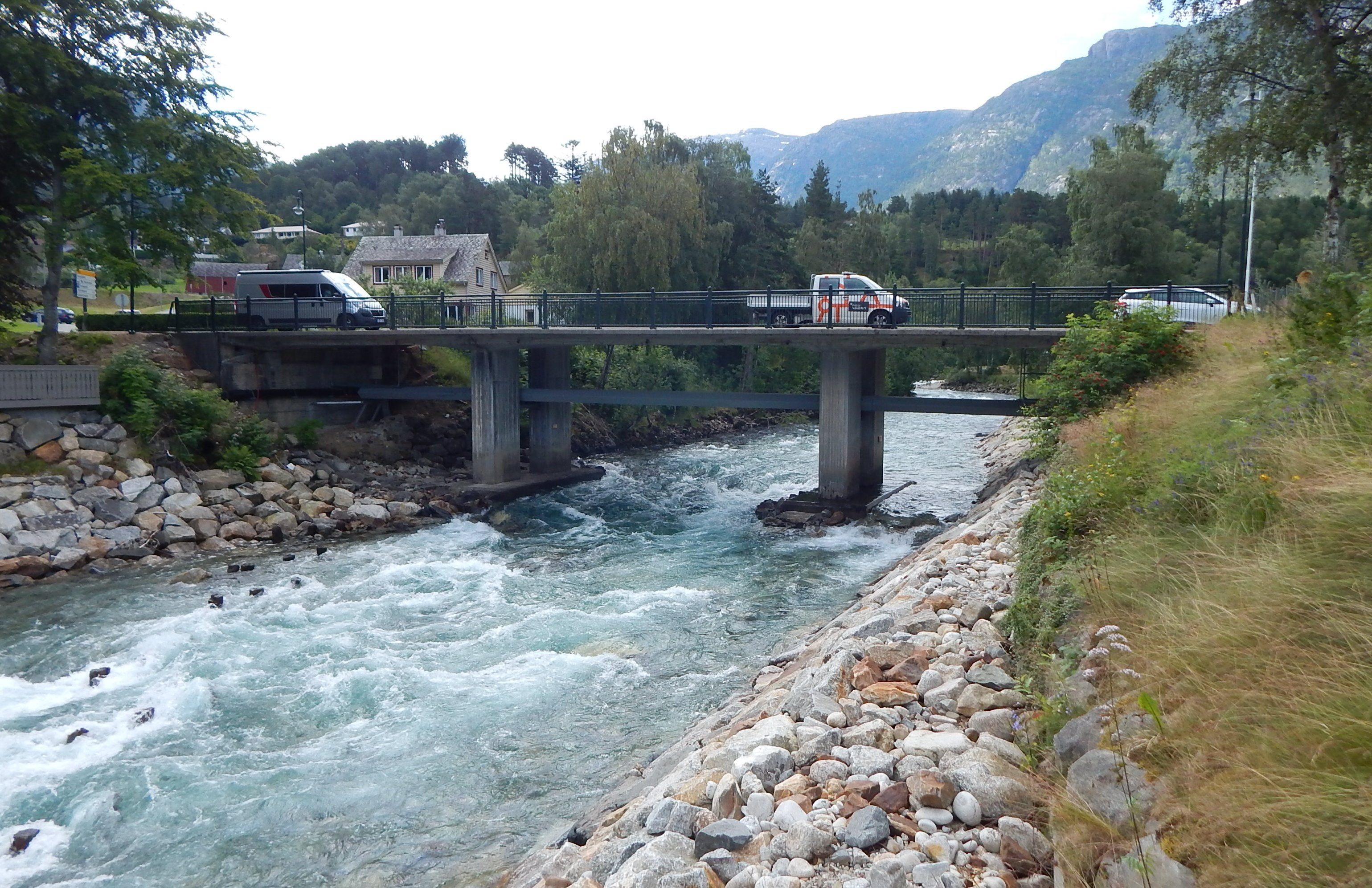 Riksvei 13 over Kinso bru i Kinsarvik